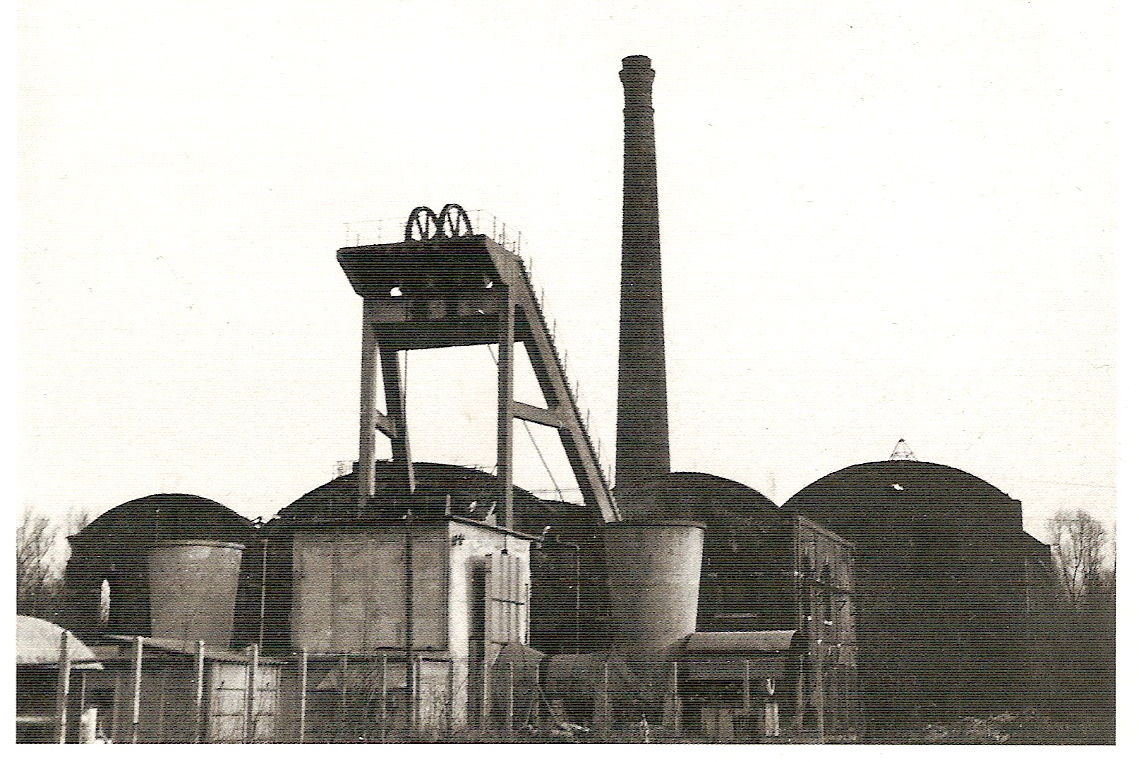 La fosse Saint-Pierre de la Compagnie des mines de Thivencelle était un charbonnage constitué de deux puits situé à Thivencelle, Nord, Nord-Pas-de-Calais, France.